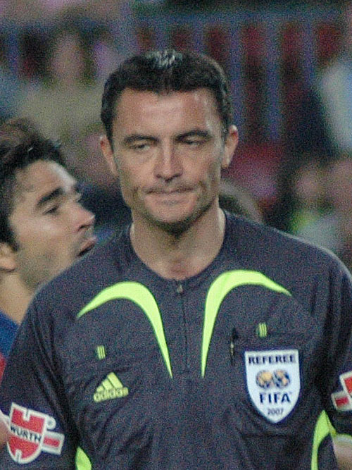 Manuel Enrique Mejuto González, árbitro de fútbol, durante el partido FC Barcelona-Getafe CF.